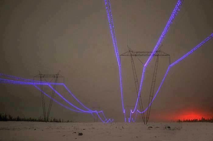 sdsadas